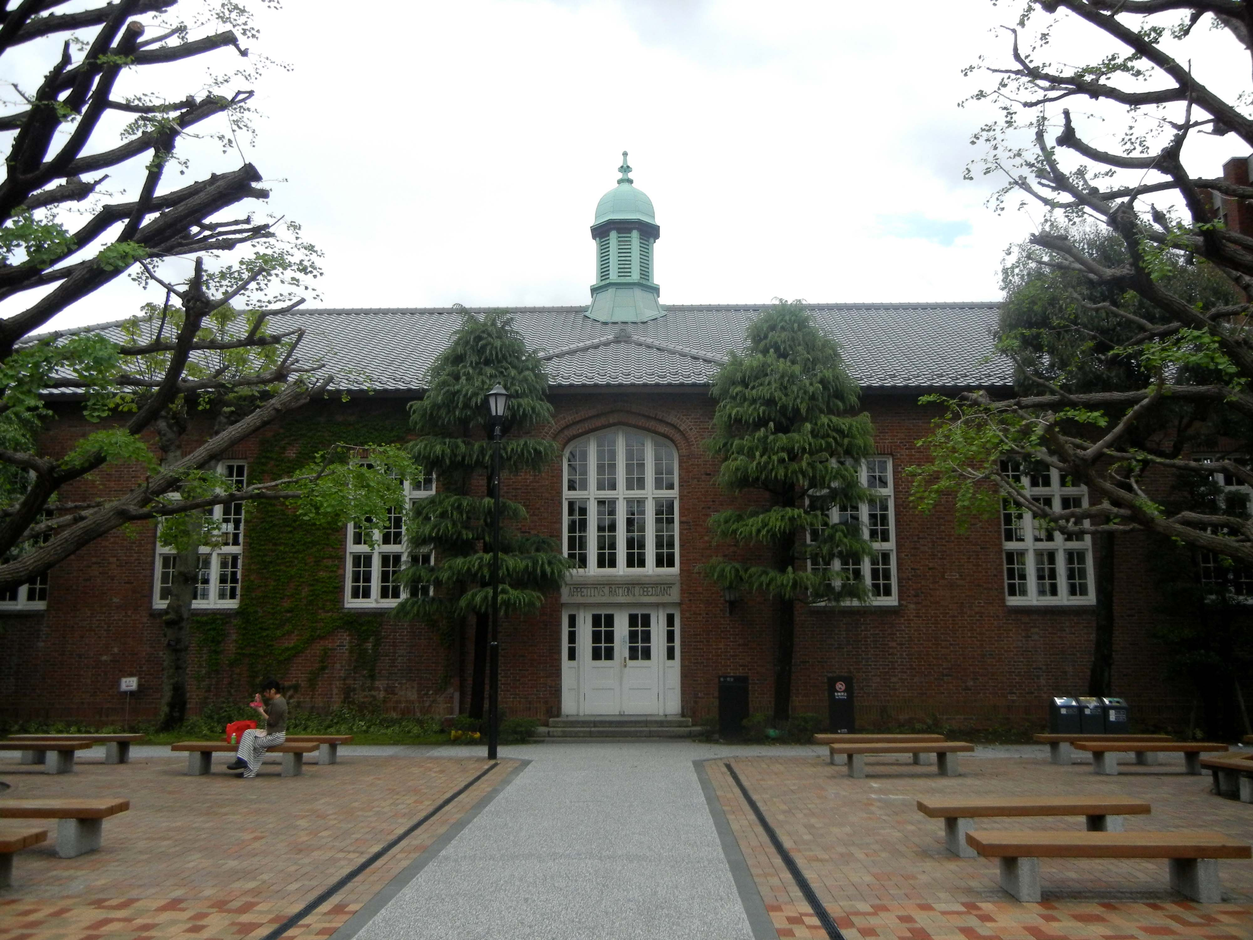 立教大学池袋キャンパス第一食堂